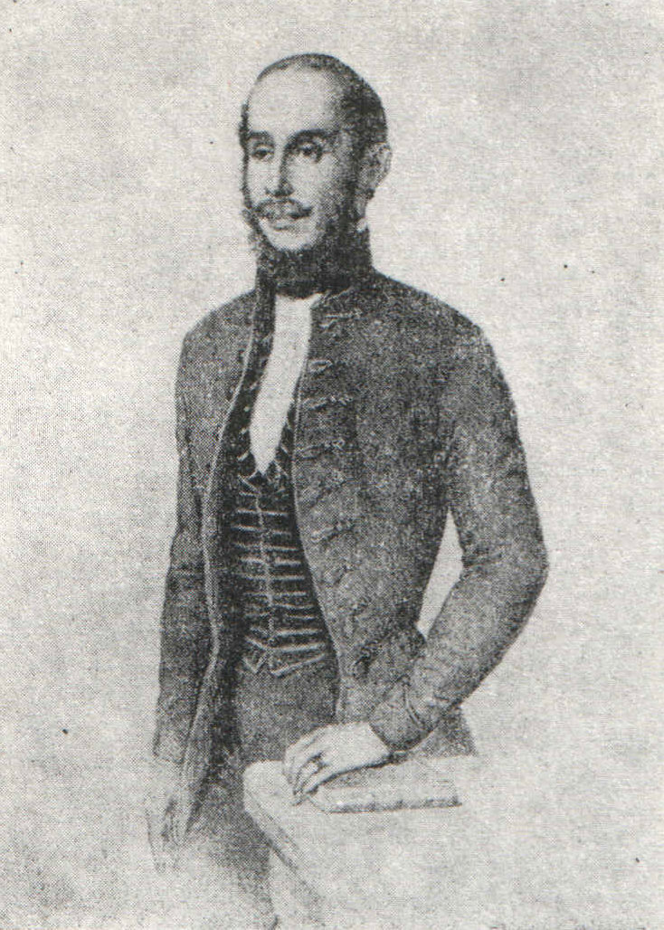 István Bocsor, professor of history in the Pápa Reformed College 1837-1885 Bocsor István, a Pápai Református Kollégium történelemtanára 1837-1885 között